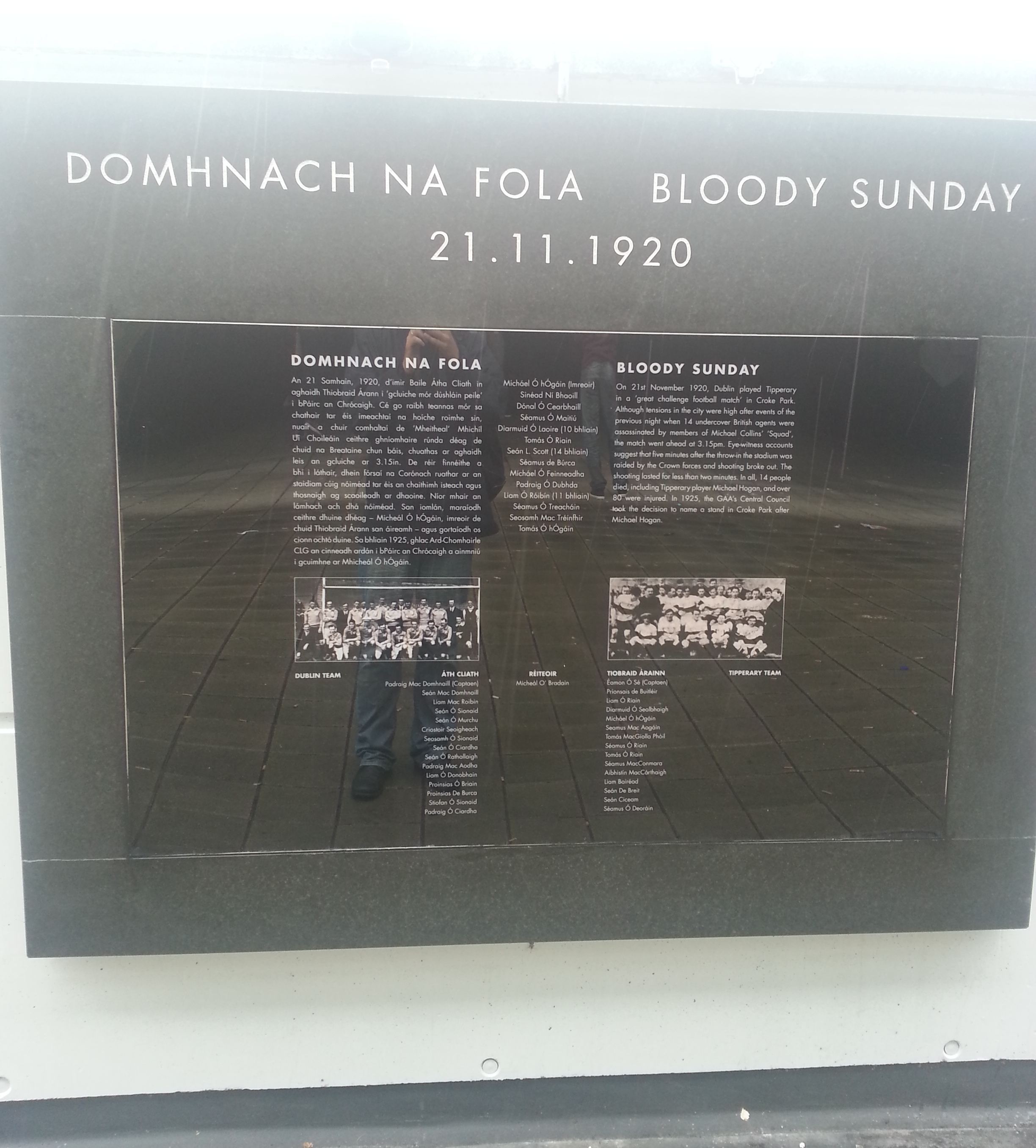 Plaque commémorative du Bloody Sunday à Croke Park